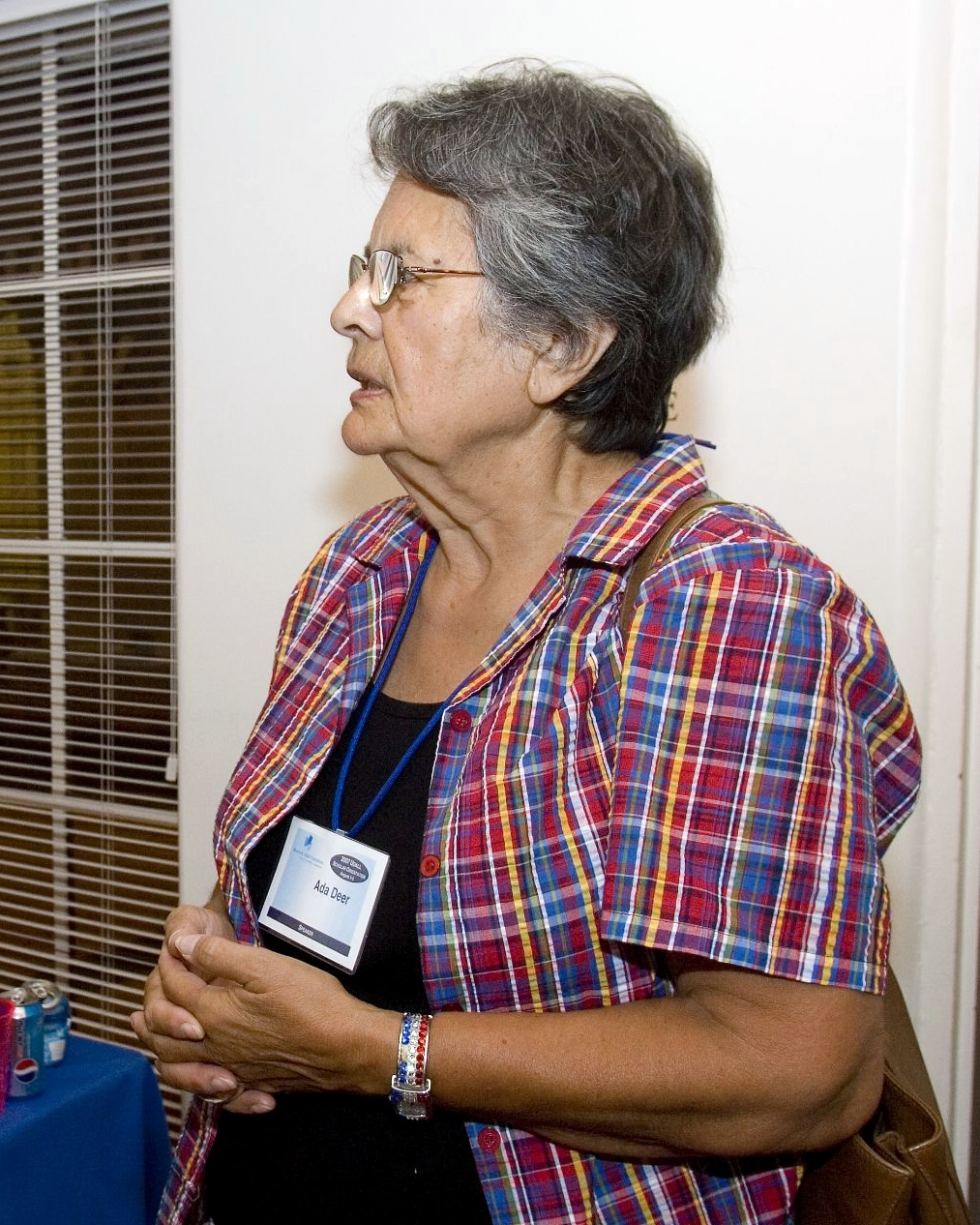 Menominee Tribal Member, Ada Deer